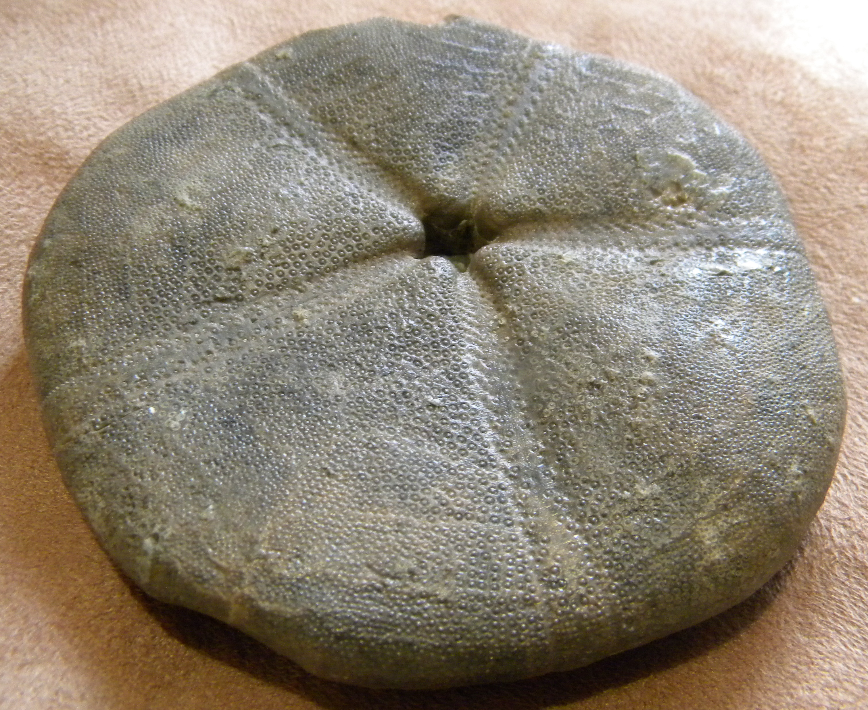 Clypeus plotii face bucale